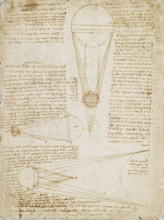 Scan d'une page du Codex de Leicester